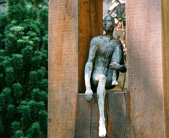 Grab des Schriftstellers und Journalisten Hans Scherer. Die Figur Faun, sitzend, von Katrin Stock wurde 2009 gestohlen, Alter St.-Matthäus-Kirchhof, Foto: L. Wekenborg